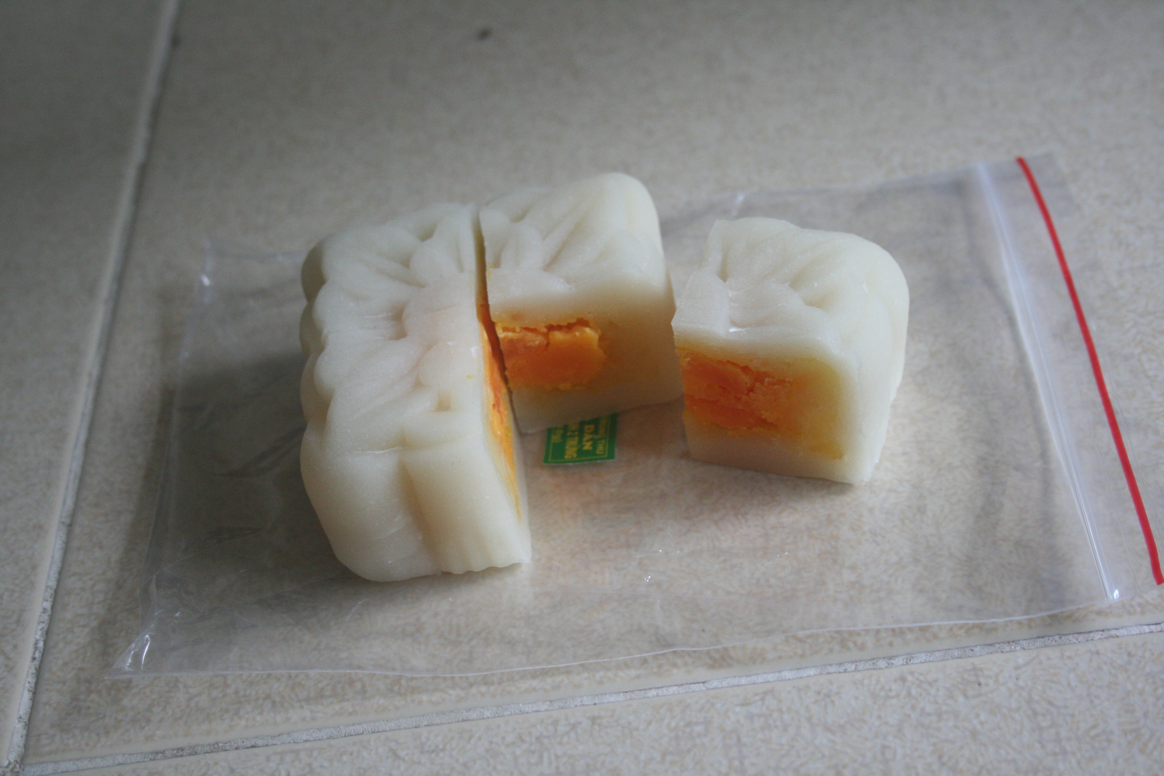 Bánh dẻo nhân đậu xanh trứng mặn